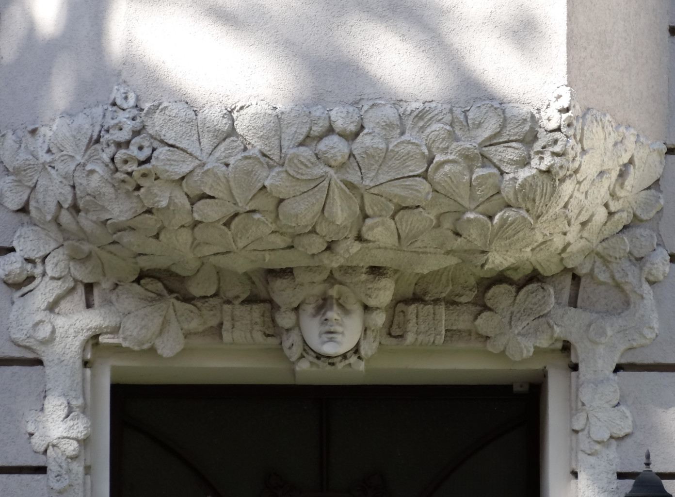 Kamienice ul. Cieszkowskiego 16-20 w Bydgoszczy (1901-1903, Karl Bergner)